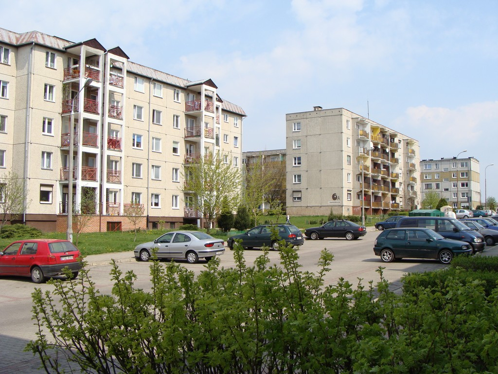 Śrem, Helenki, ul. Konstytucji 3 Maja.